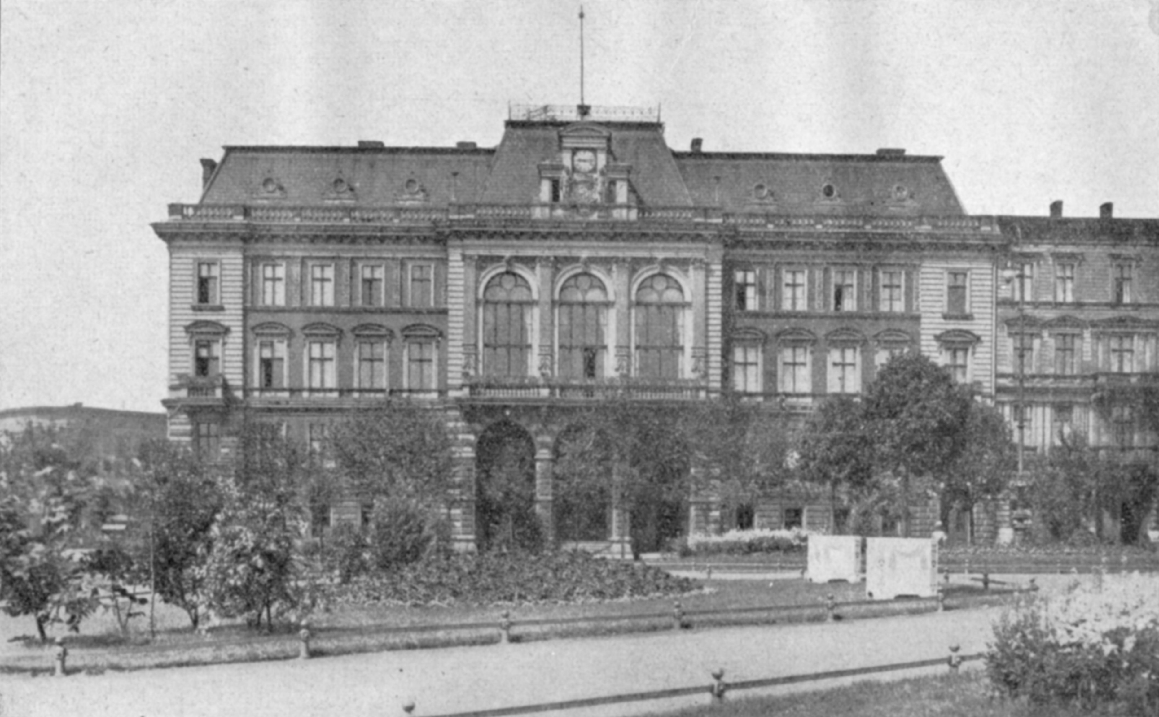 Ratusz w Królewskiej Hucie (późniejszy Chorzów) przed przebudową.